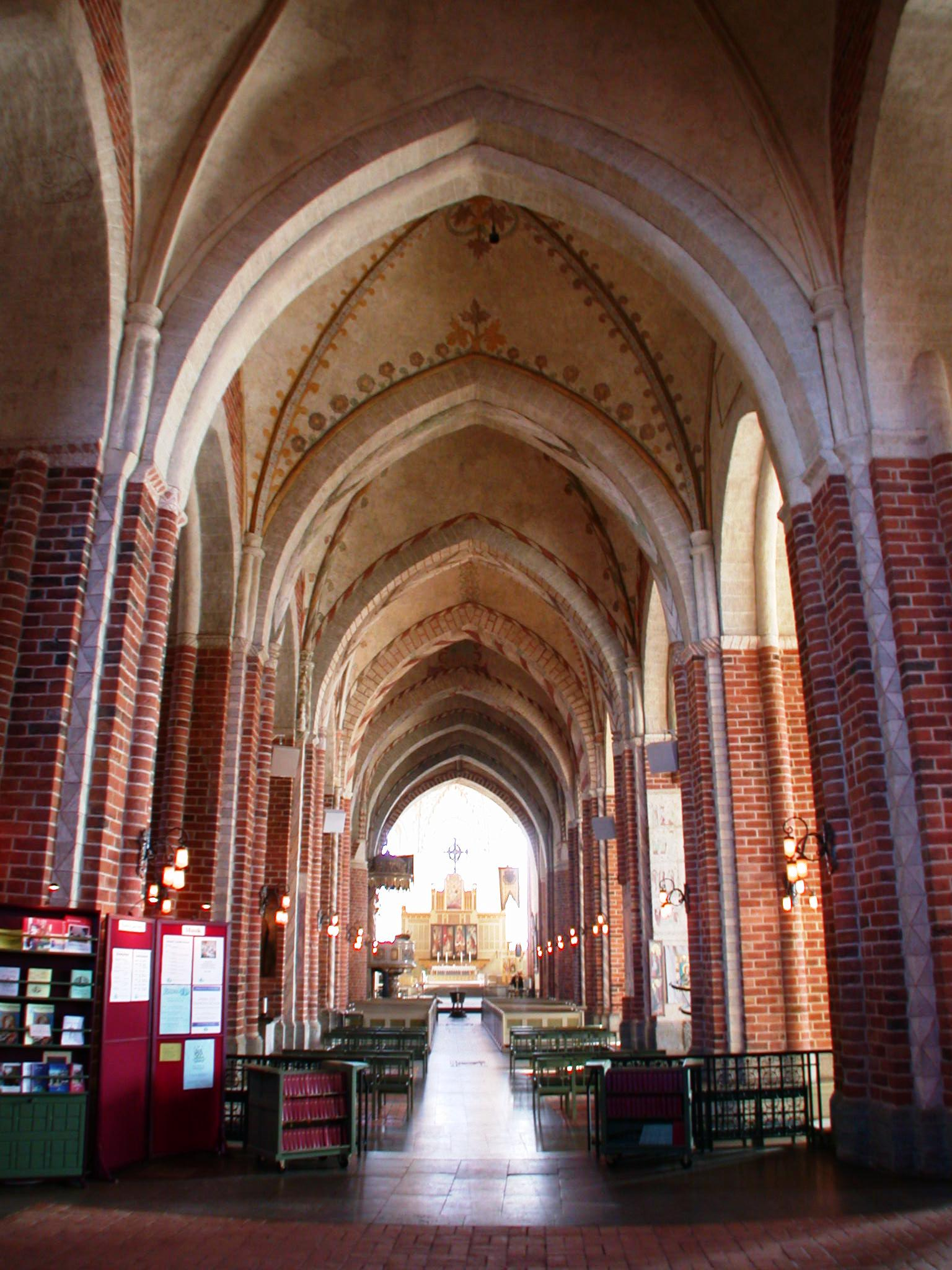 Strängnäs cathedral, Strängnäs, Sweden. Photo by Riggwelter, March 10, 2007.